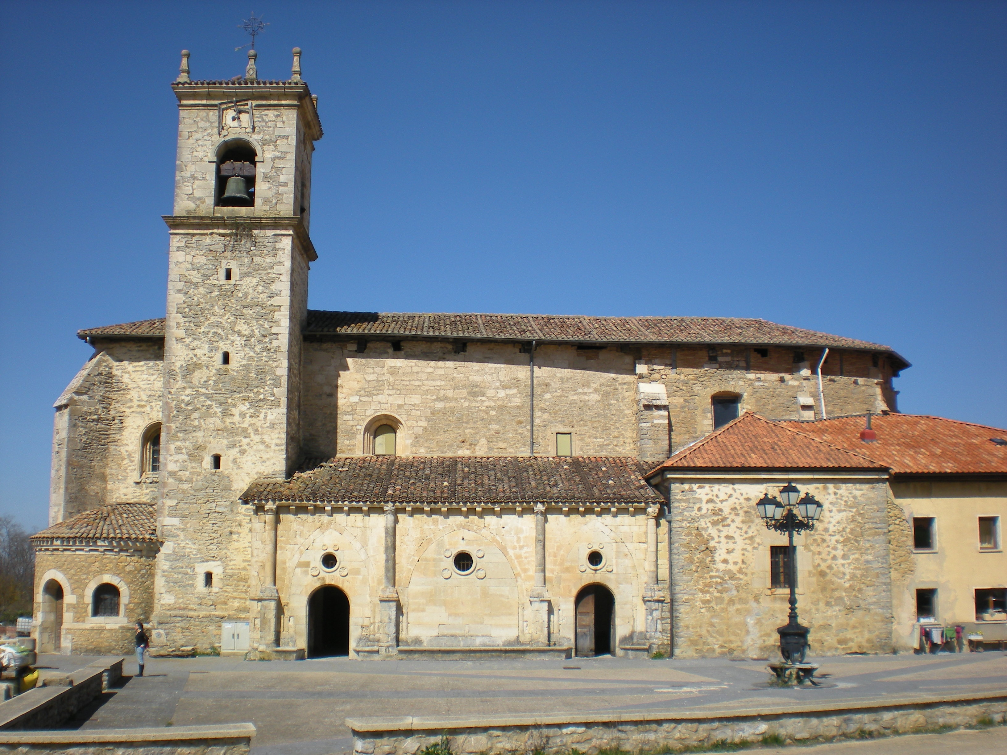 San Andres eliza (Erentxun, Iruraitz-Gauna, Araba)